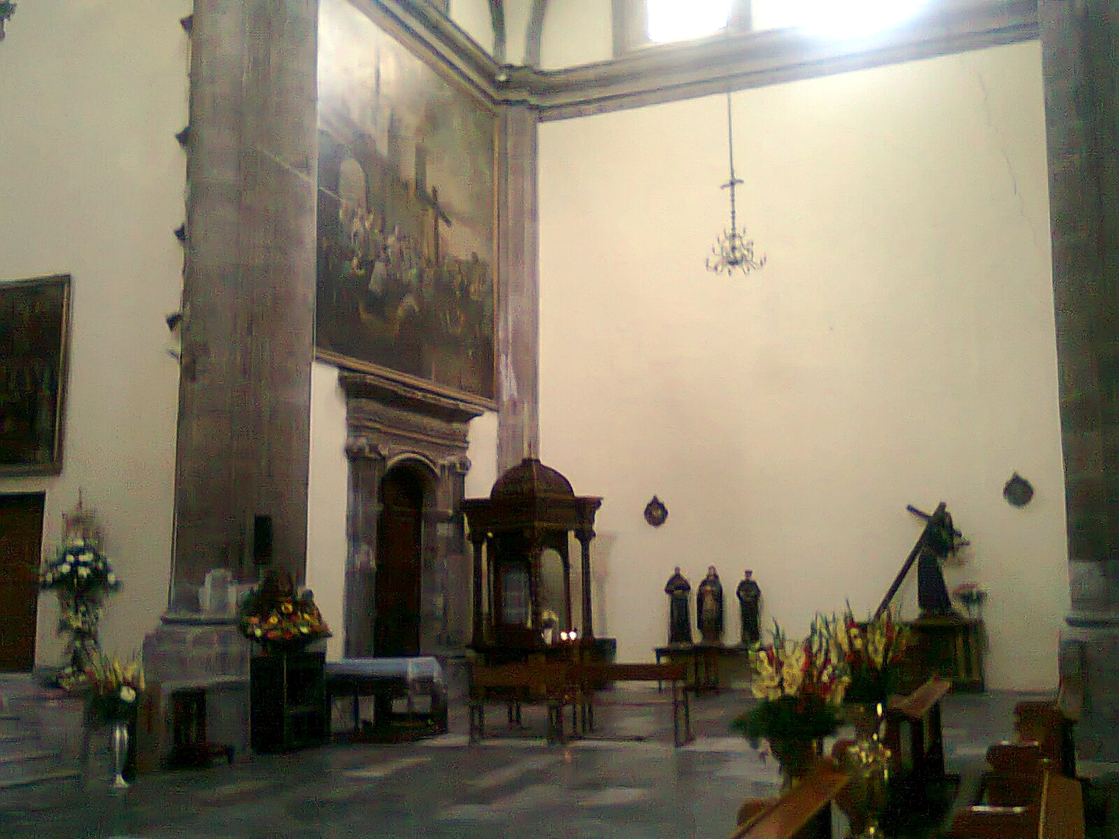 Una zona marginal en el Centro Histórico de la Ciudad de México, los indigentes y sexo servidores se acercan a la plaza a descansar. Algunos viven ahí pero desde hace mucho tiempo ha sido y será un lugar donde los que viven en soledad se acercan a sentir compañía. Esta al altura del Mercado de Mixcalco pero dentro del Barrio de la Merced.